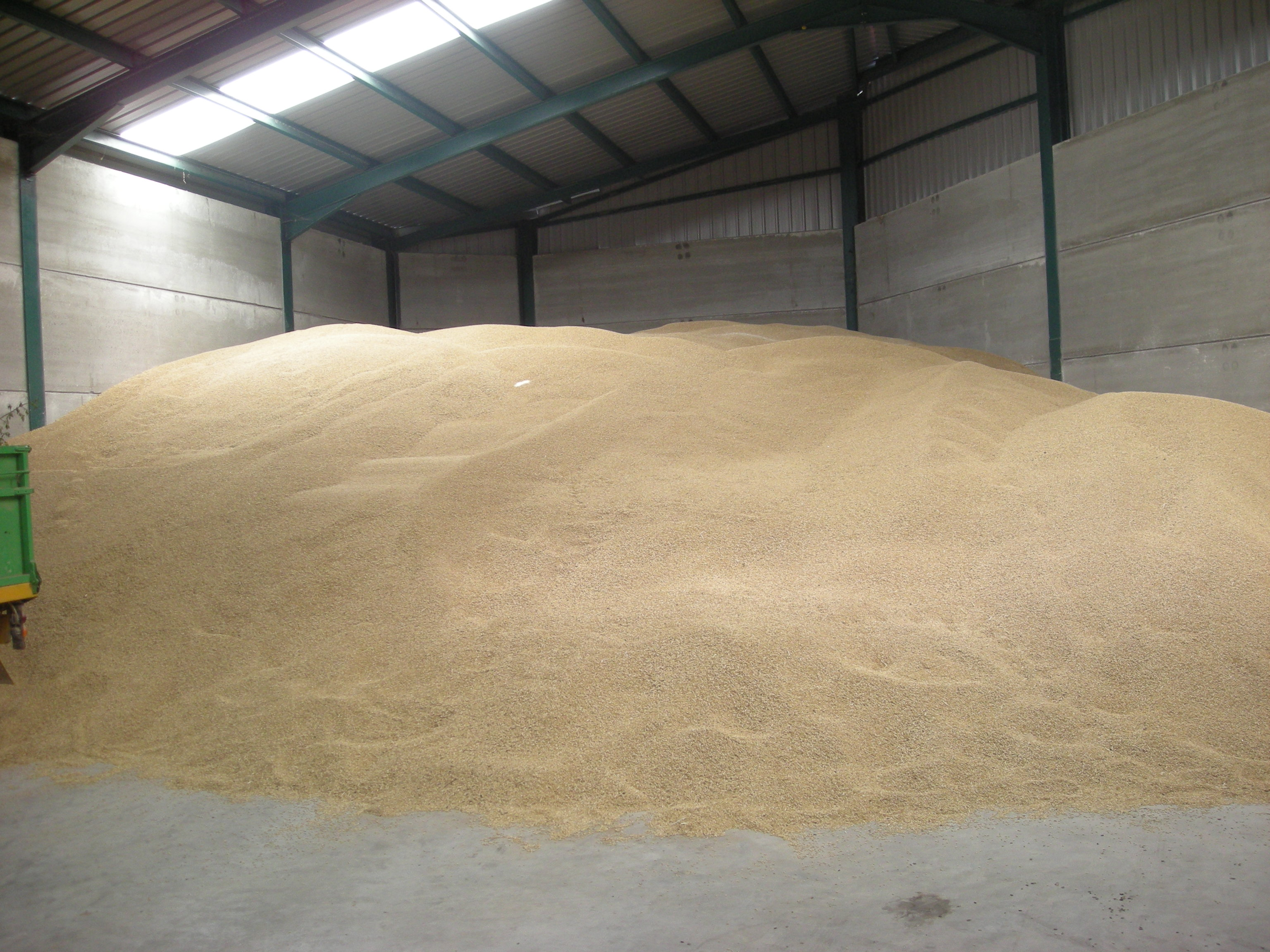 Almancén de Cebada (Hordeum vulgare) en Cuenca, España